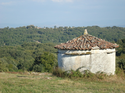 Pombal en Domecelle, concello de San Xoán de Río (Ourense).